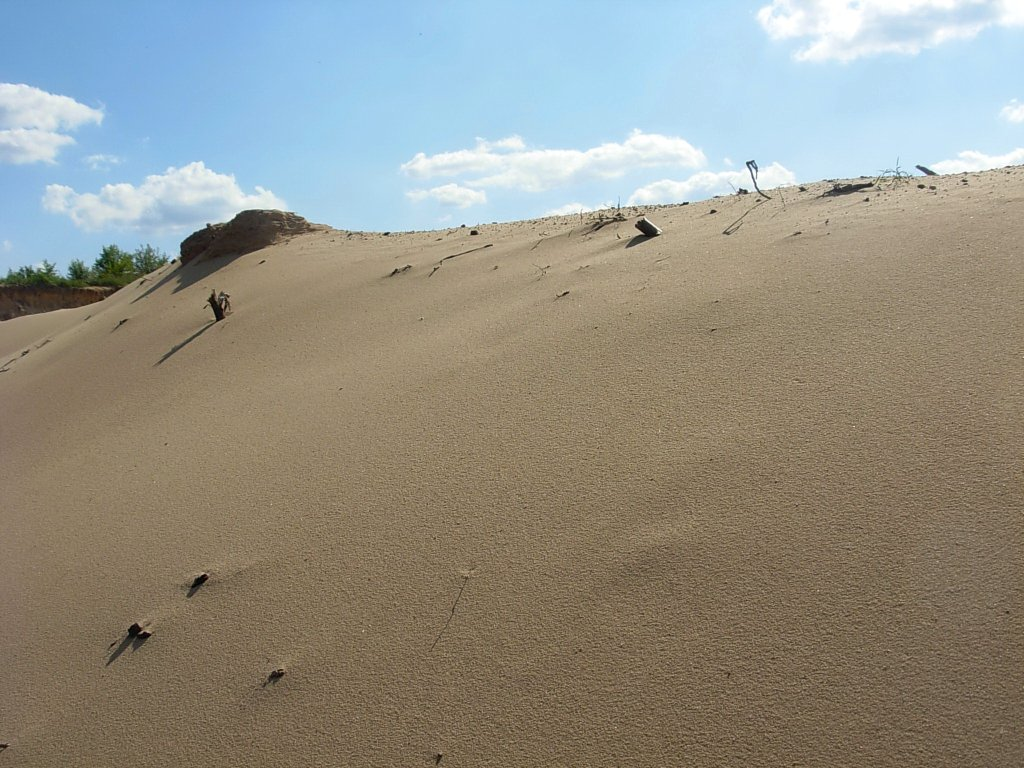 Puszcza Bydgoska - ruchoma wydma piaszczysta